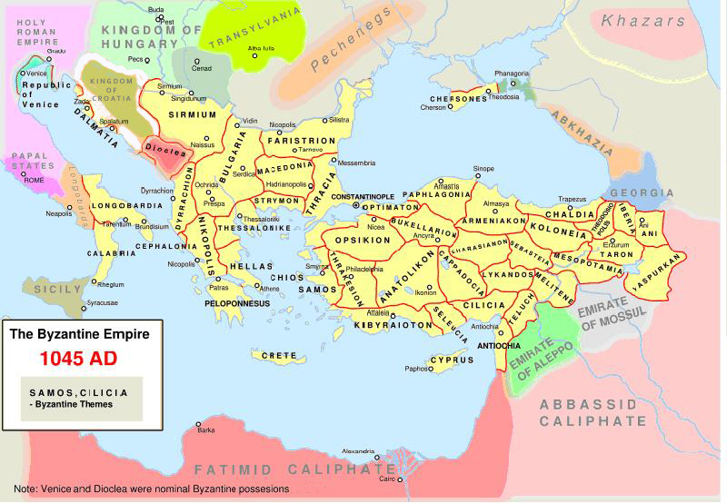 I themata dell'impero bizantino, nel 1045.